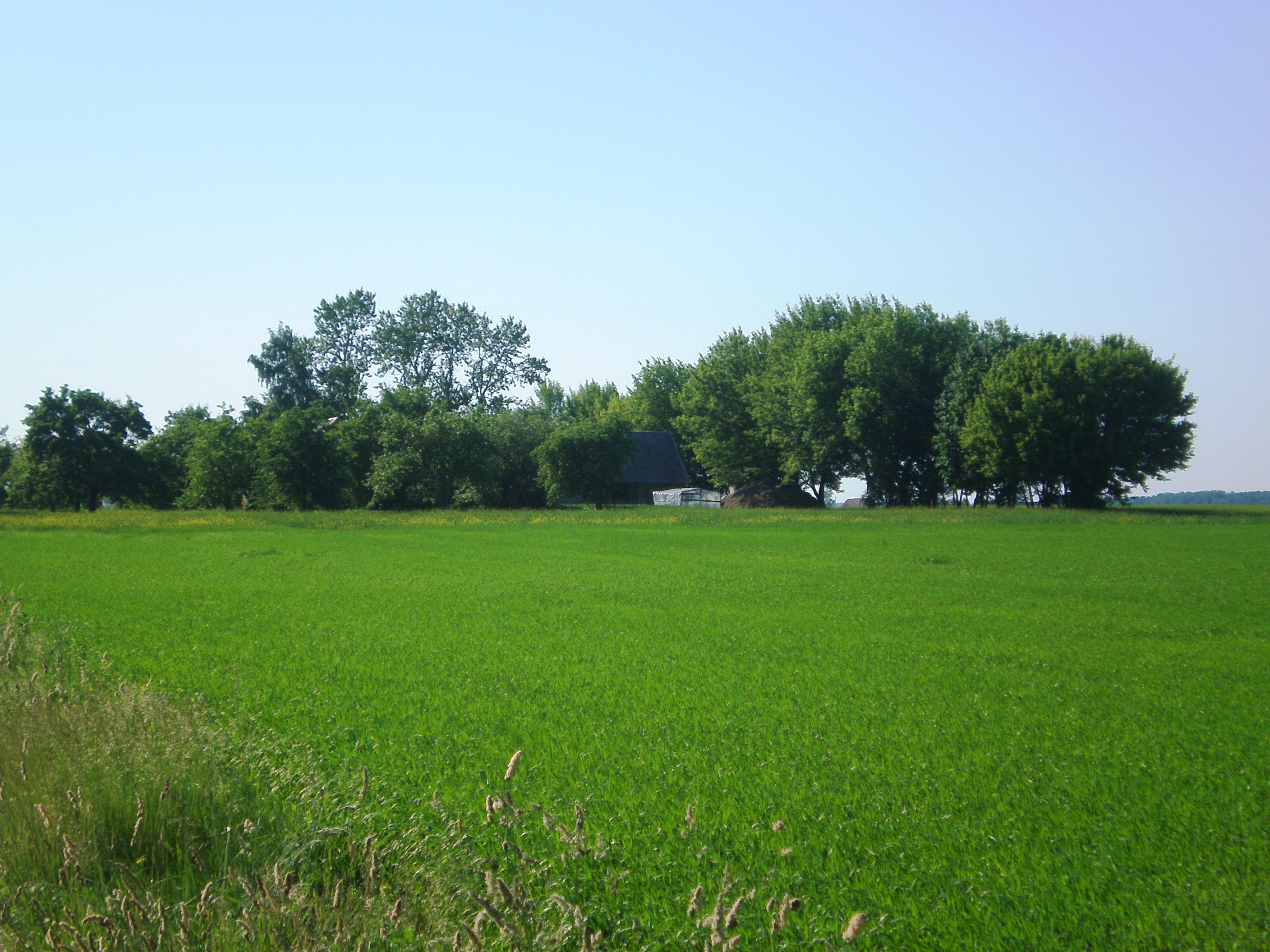 Urbeliai, Kėdainių raj.